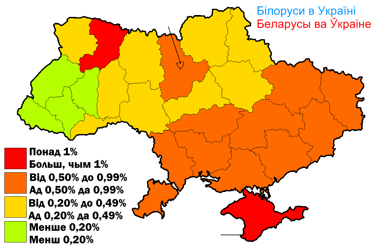 Беларусы ва Ўкраіне па абласьцёх